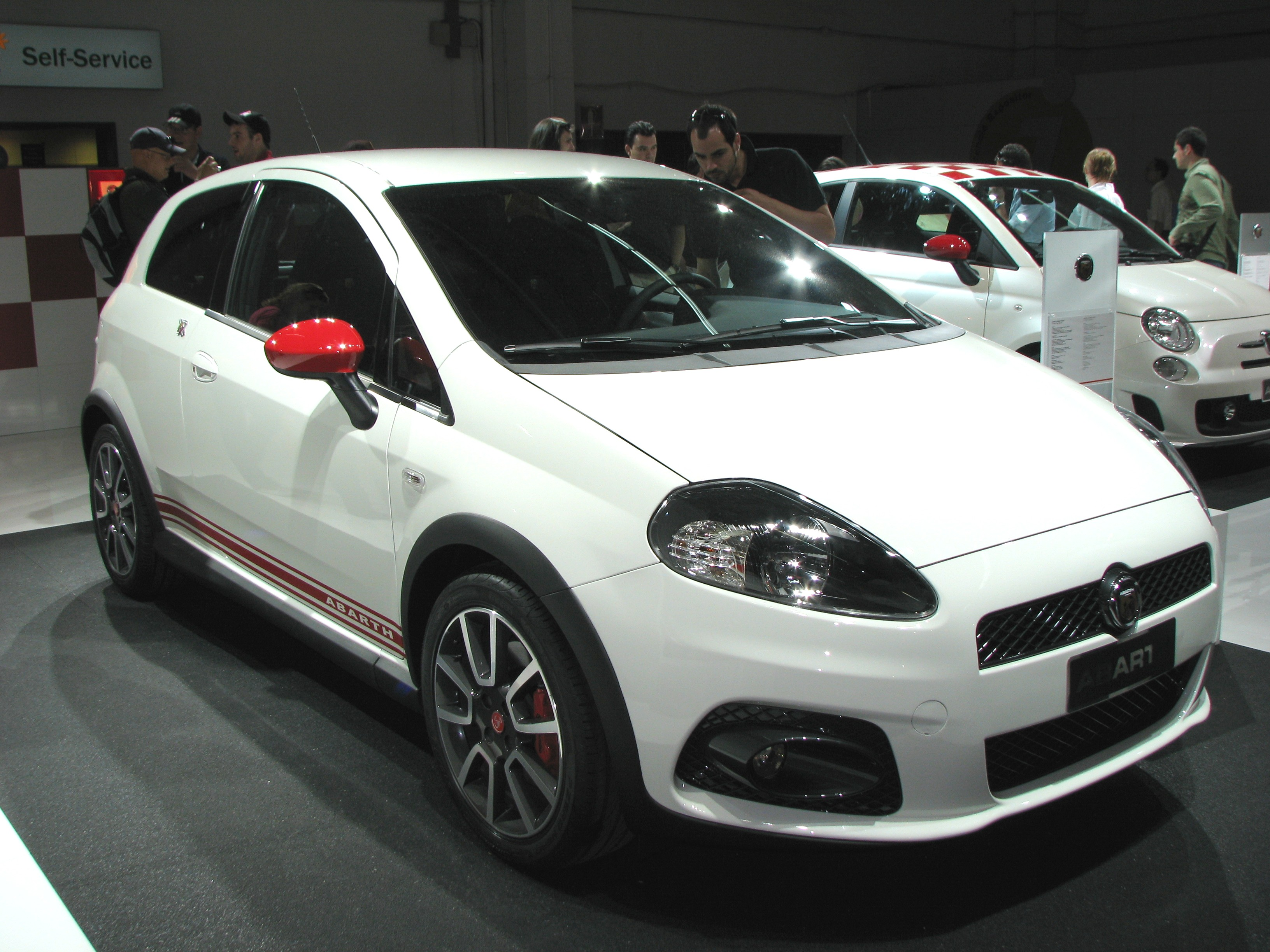 Abarth Grande Punto a la fira de l'automòbil de Barcelona 2009.